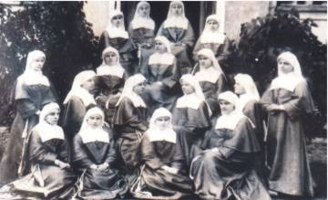 Siostry Mariawitki ok. 1910r.